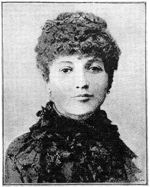 Carolina Invernizio (1858-1916), Italian writer